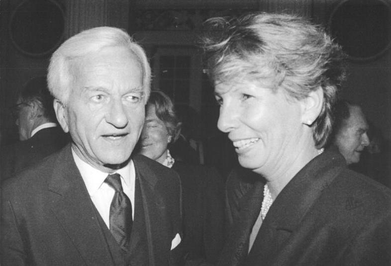 ADN-Bernd Settnik 2.10.90 Berlin: Bundespräsident Richard von Weizsäcker und das amtierende DDR-Staatsoberhaupt, VK-Präsidentin Dr. Sabine Bergmann-Pohl, kurz vor Beginn des Festaktes im Schauspielhaus. Mit dem Festakt der DDR-Regierung begann die Reihe offizieller Veranstaltungen zum Tag der Deutschen Einheit.